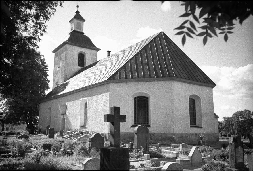 Vislanda kyrka